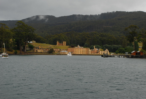 中文（中国大陆）: 塔斯马尼亚的亚瑟港（雨中）